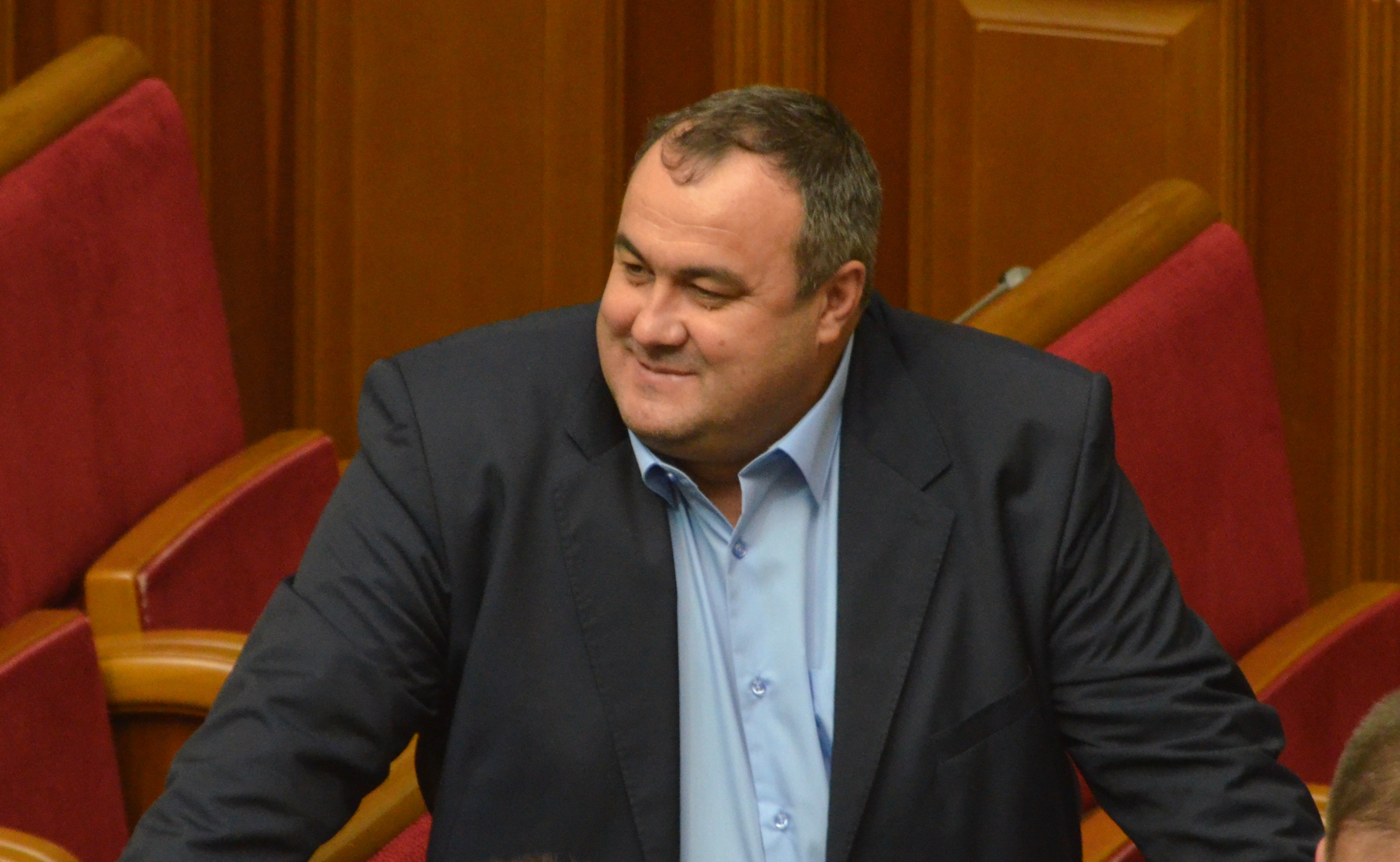 фотографія українського політика Григорія Тіміша. Фотографія зроблена під час засідання Верховнорї Ради України 2 жовтня 2018 року